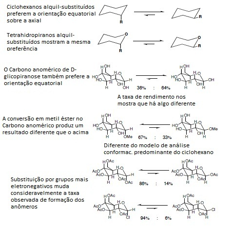 Histórico das observações das análises de conformação anoméricas